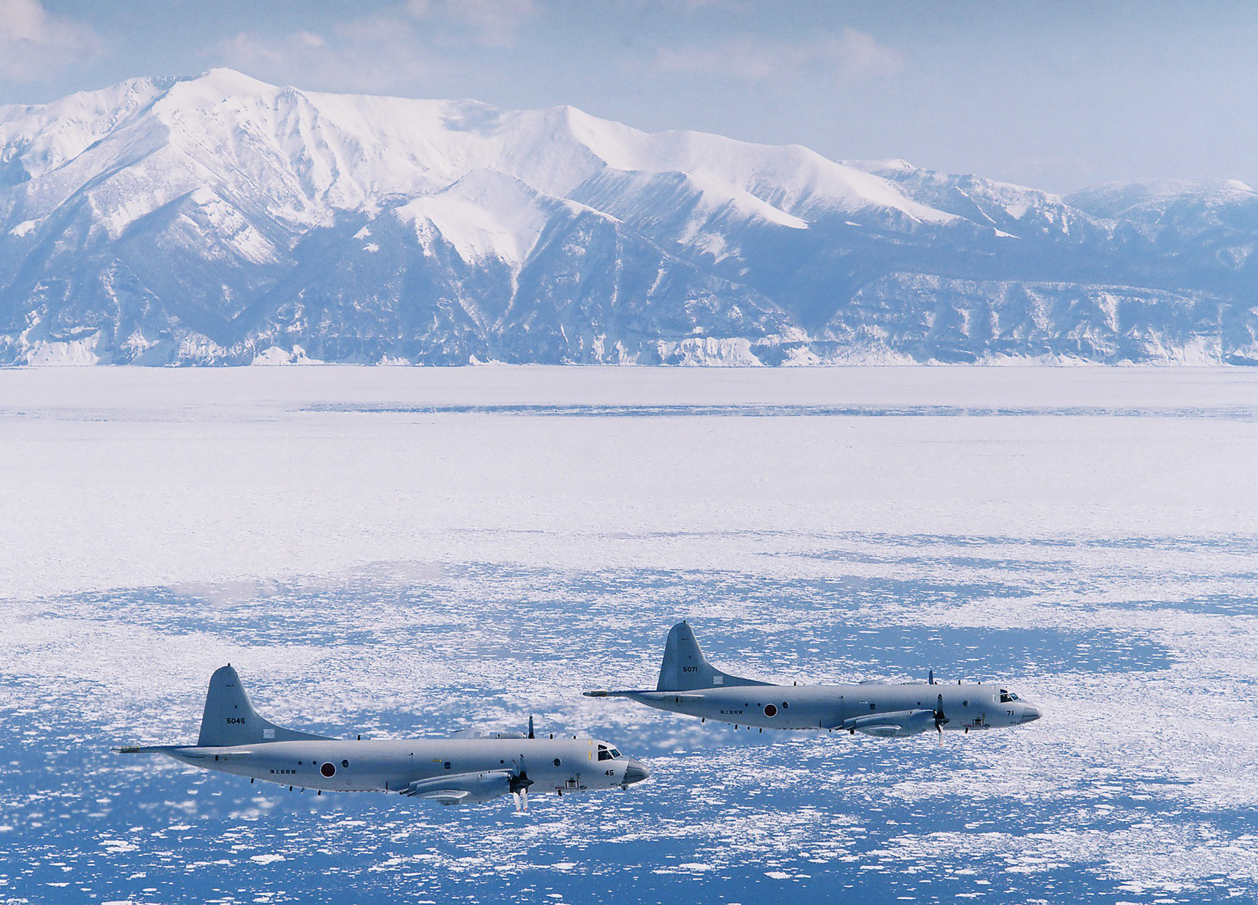 JMSDF FleetAirWing2 P-3C at Okhotsk Sea